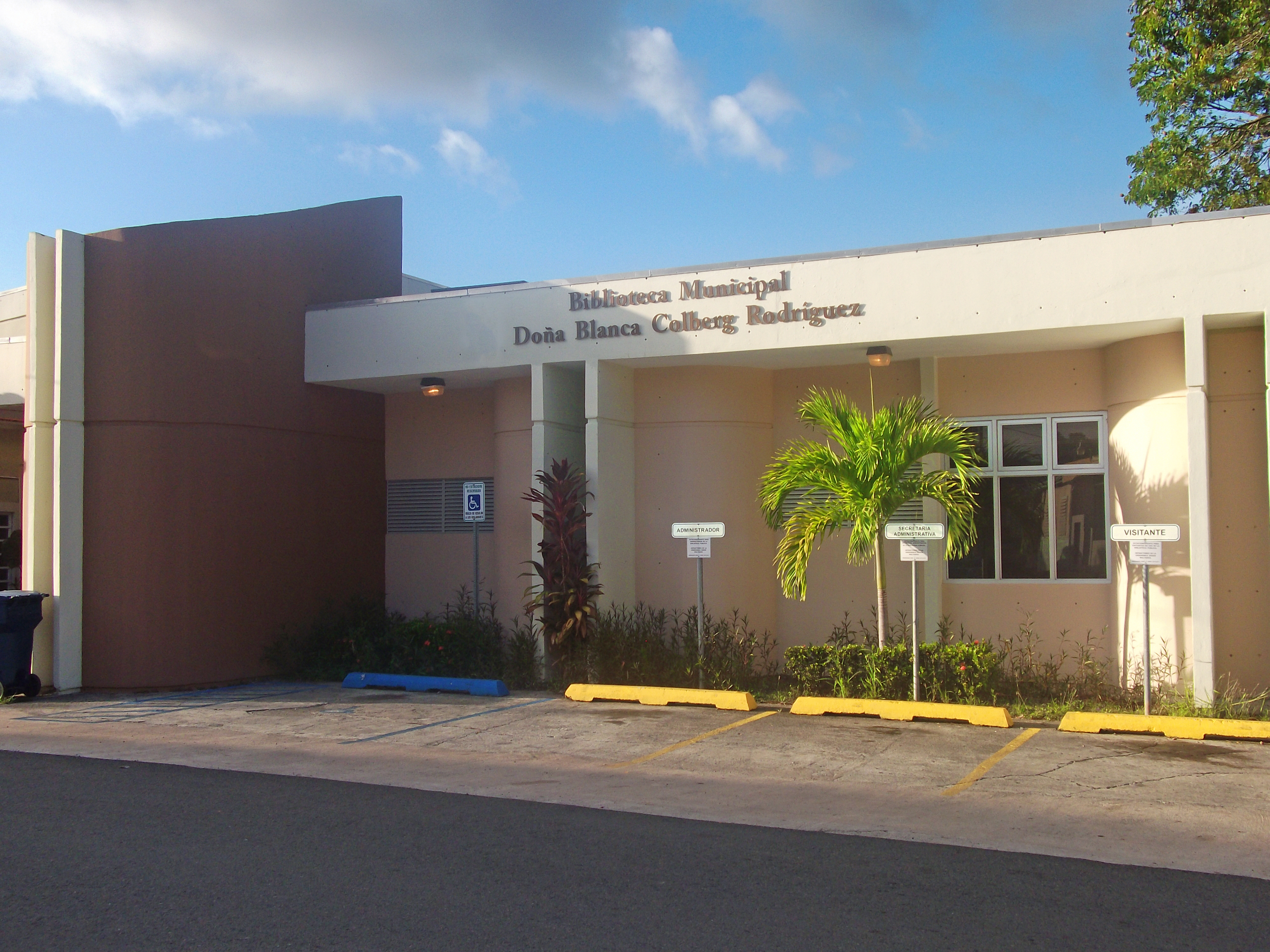 Biblioteca Municipal - Centro